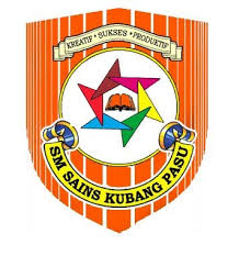 Sekolah Berasrama Penuh